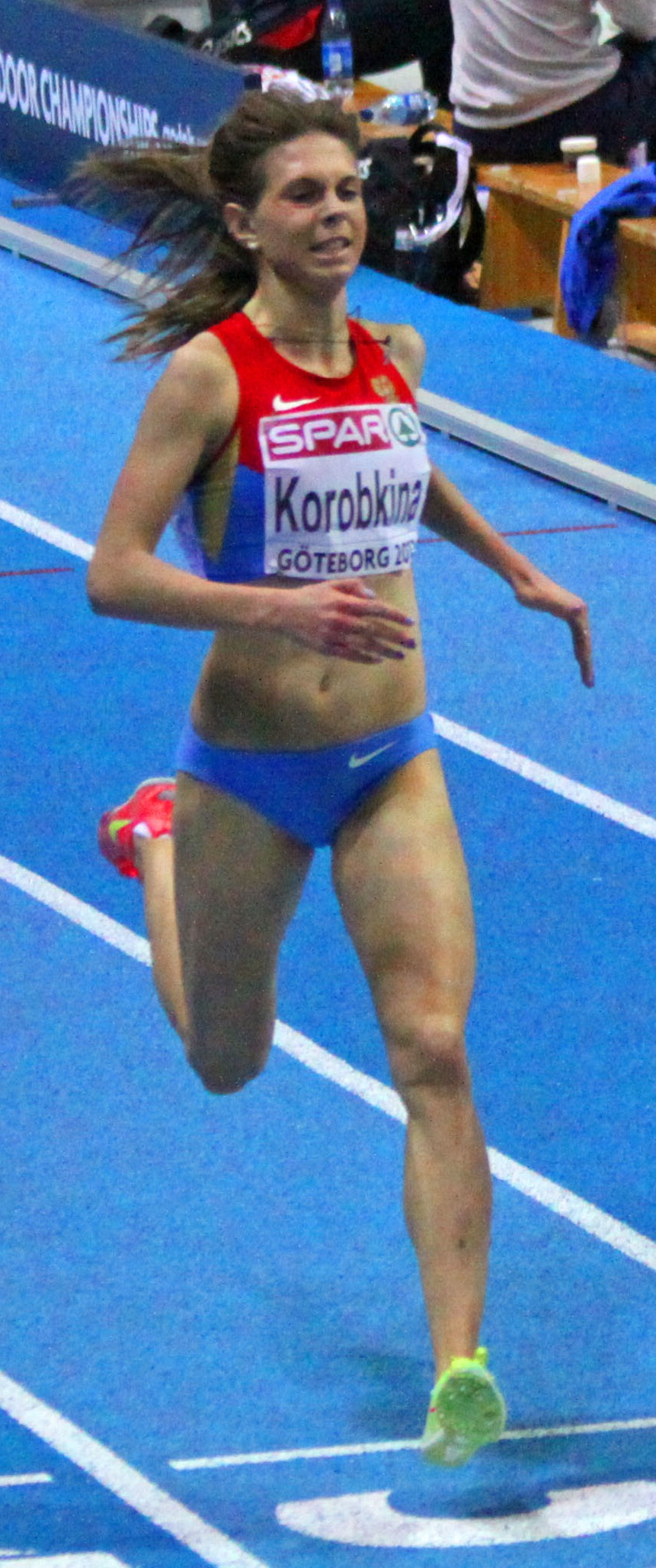 Yelena Korobkina at 3000m Göteborg. 3000m på Friidrotts EM.